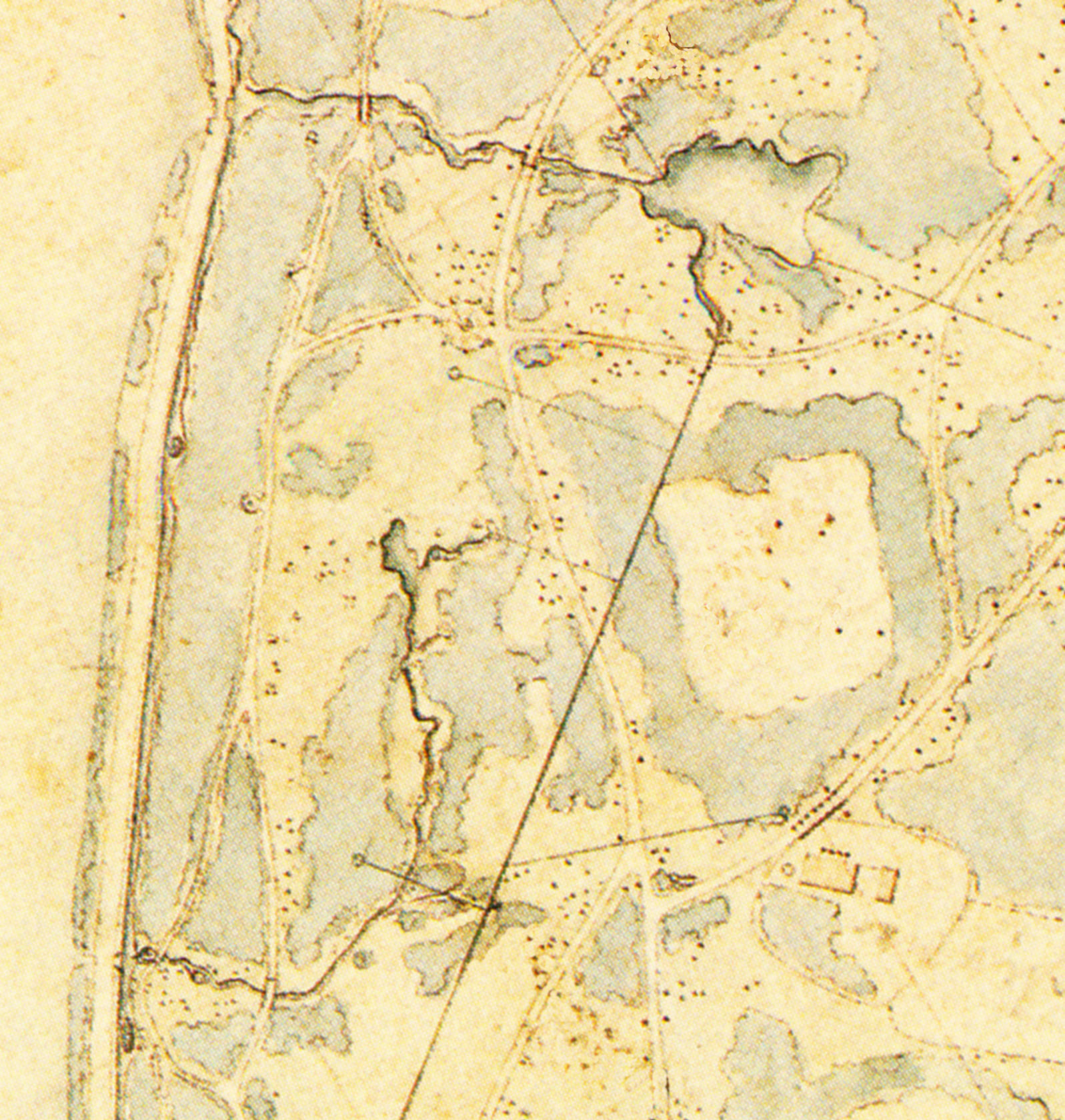 Ausschnitt aus dem Parkplan Klein-Glienicke, Gustav Meyer 1845 (Druckvorlage)